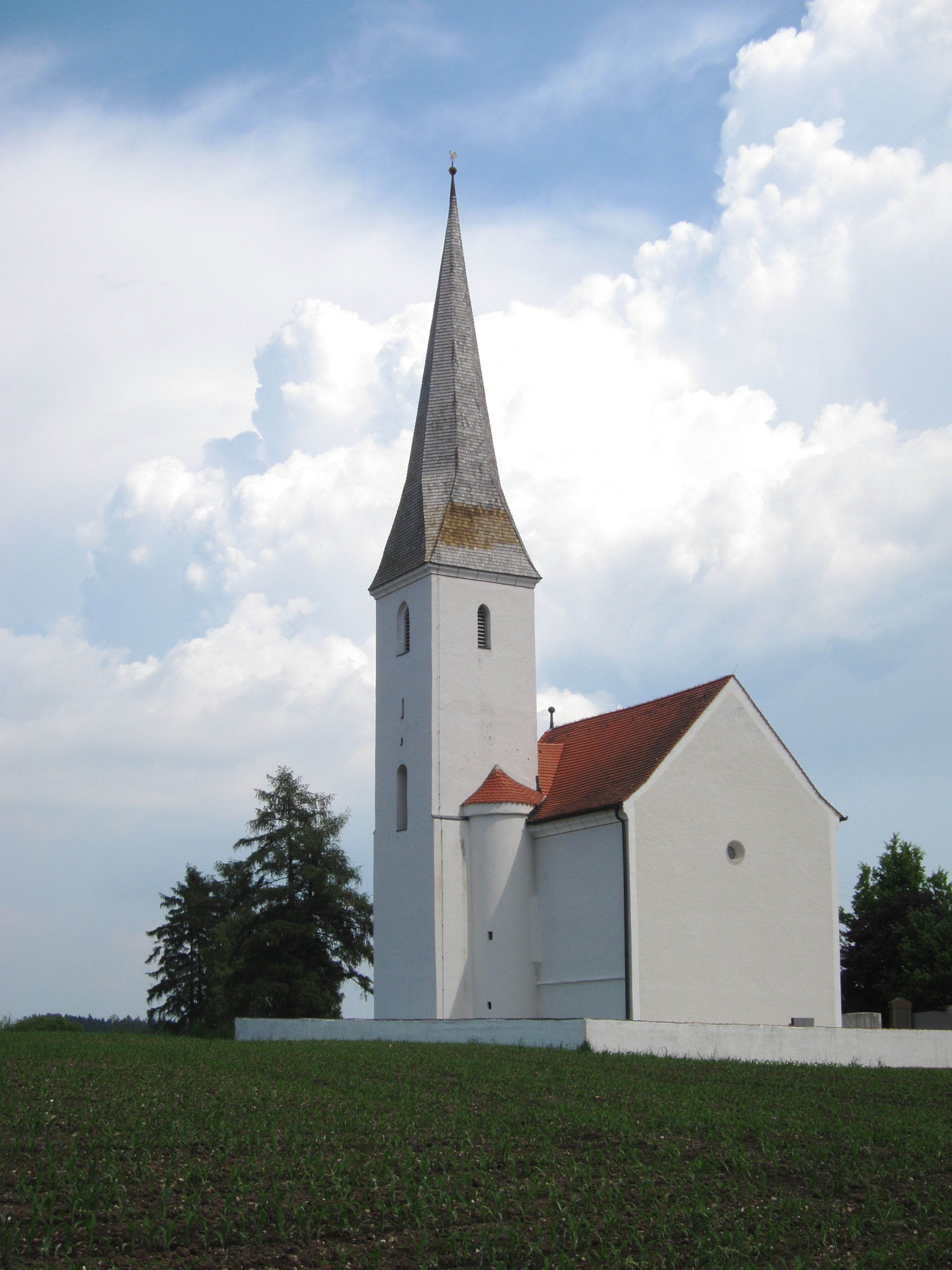 Traxl; Filialkirche St. Anna; kleine spätgotische Anlage von 1497; mit Ausstattung.